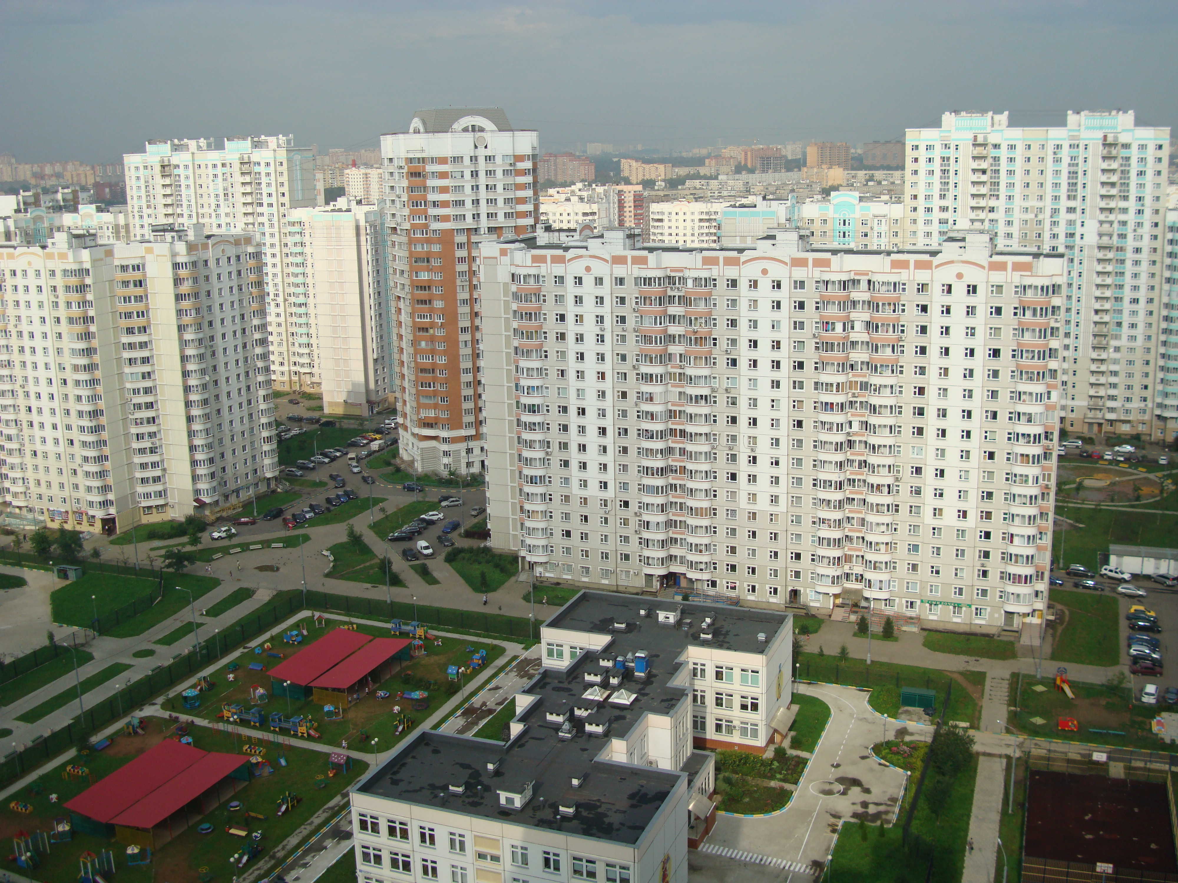 Вид на Люберцы со стороны проспекта Гагарина